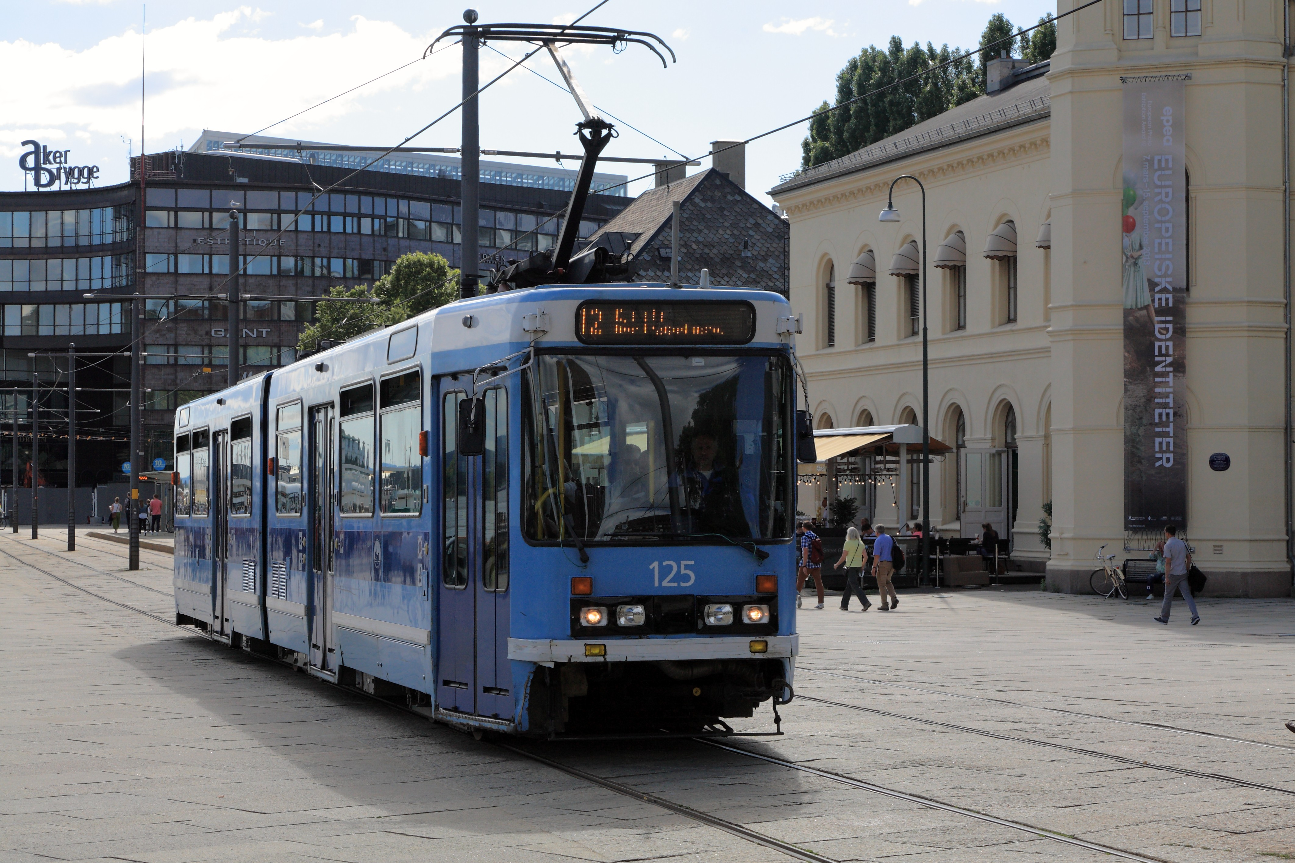 Zug der Linie 12 nach Kjelsås vor dem ehemaligen Bahnhof Oslo West